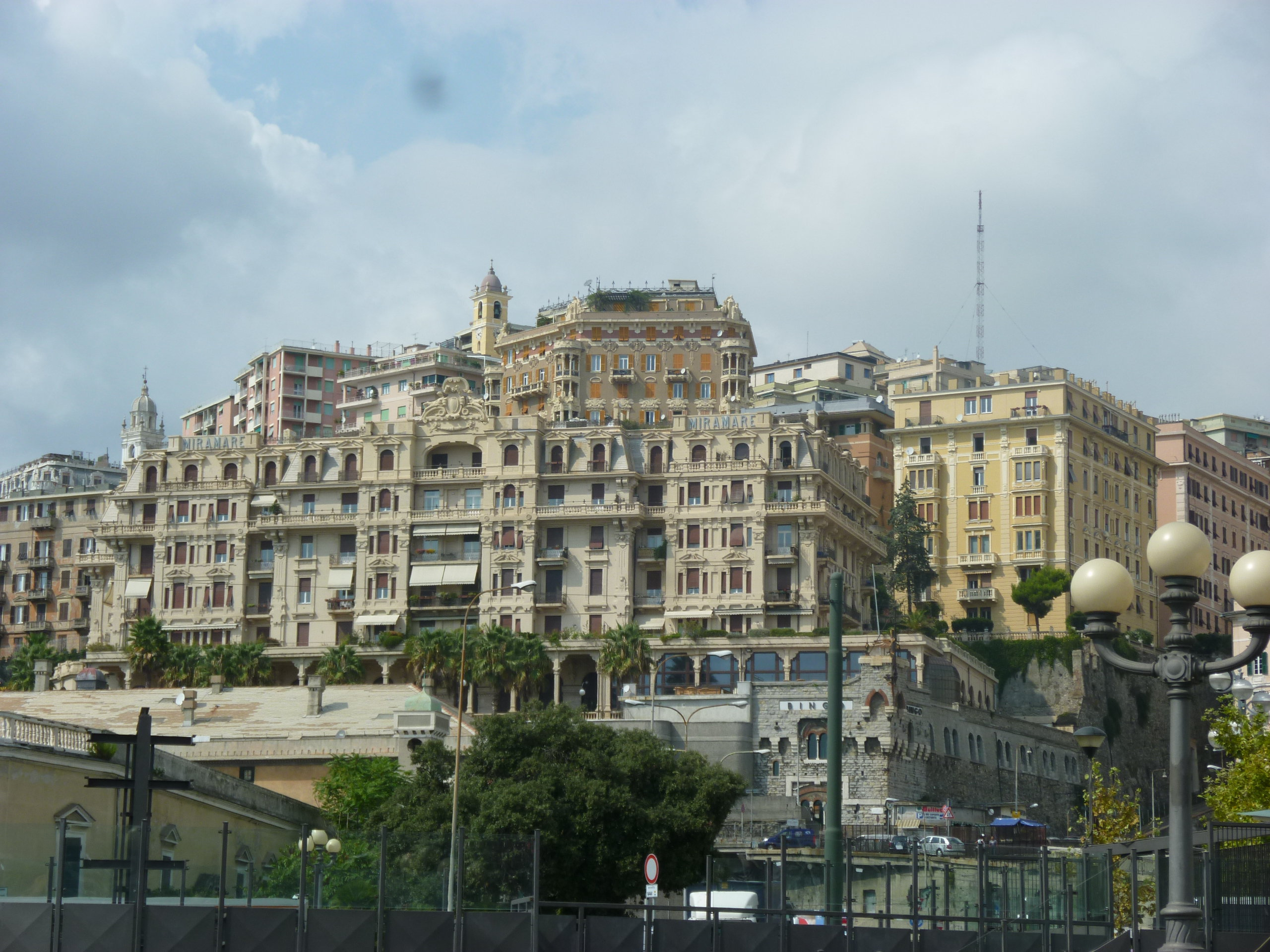 Genova, l'ex hotel Miramare, nei pressi della stazione Principe